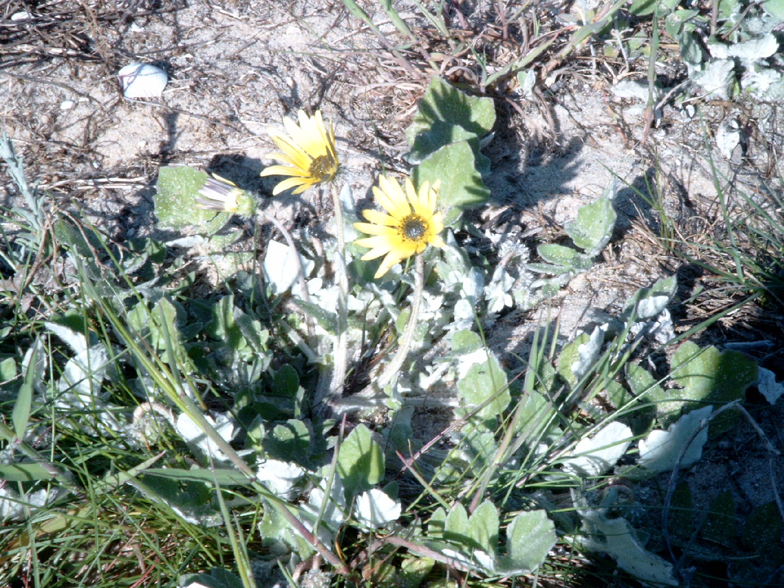 Species Arctotheca calendula Familia Asteraceae